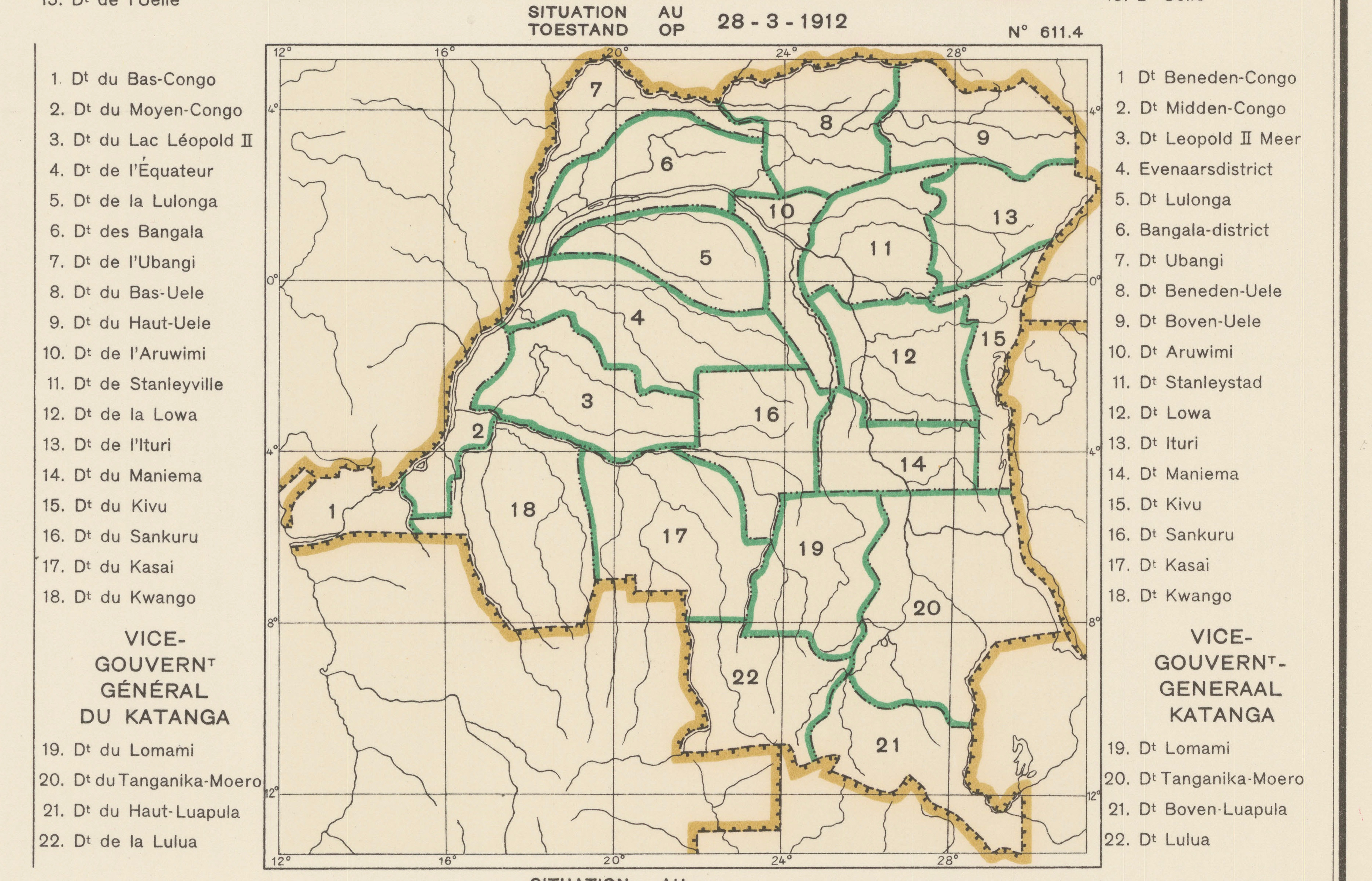 Carte des subdivisions administrative